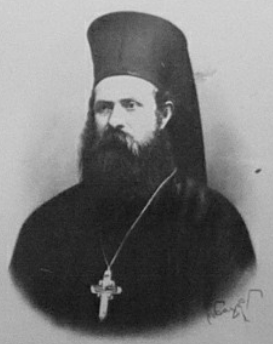 Козма Дебърски.